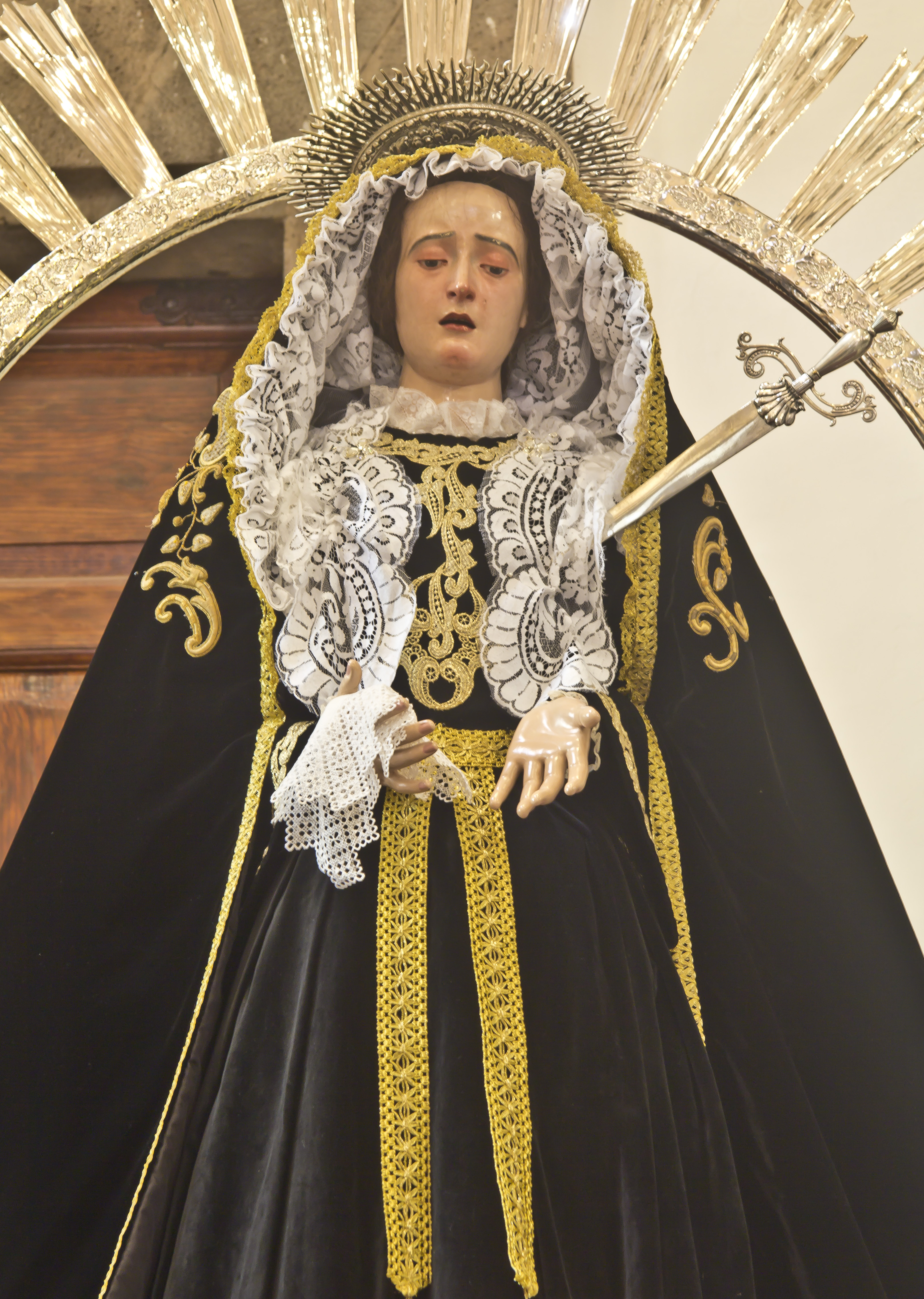 Paso de Nuestra Señora de la Soledad